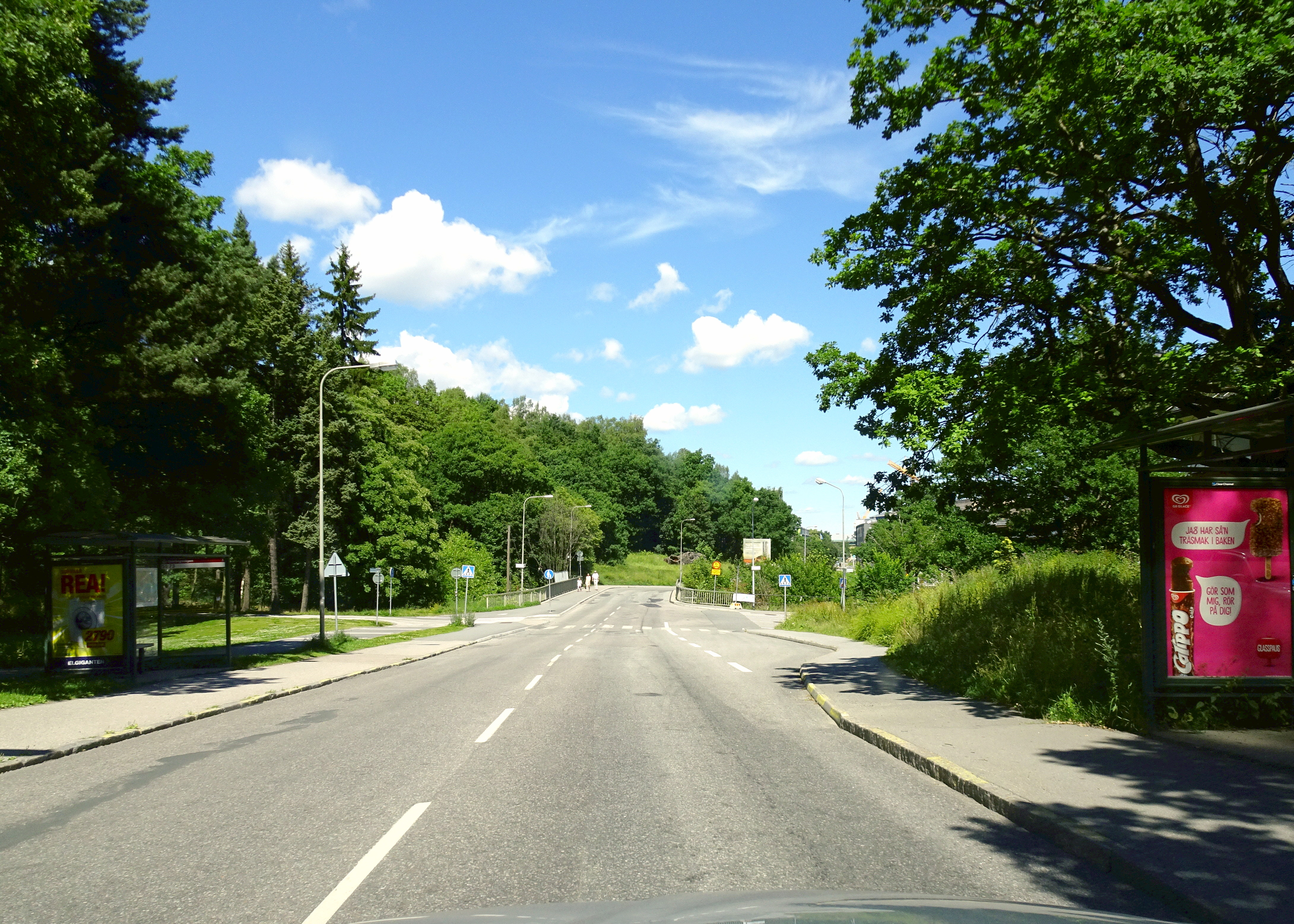 Fiskartorpsvägen